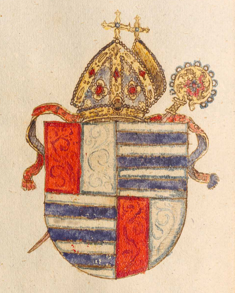 Wappen Johann Otto von Gemmingen, Fürstbischof von Augsburg (Feld 1 und 4: Bistum Augsburg; Feld 2 und 3: Familienwappen Gemmingen)